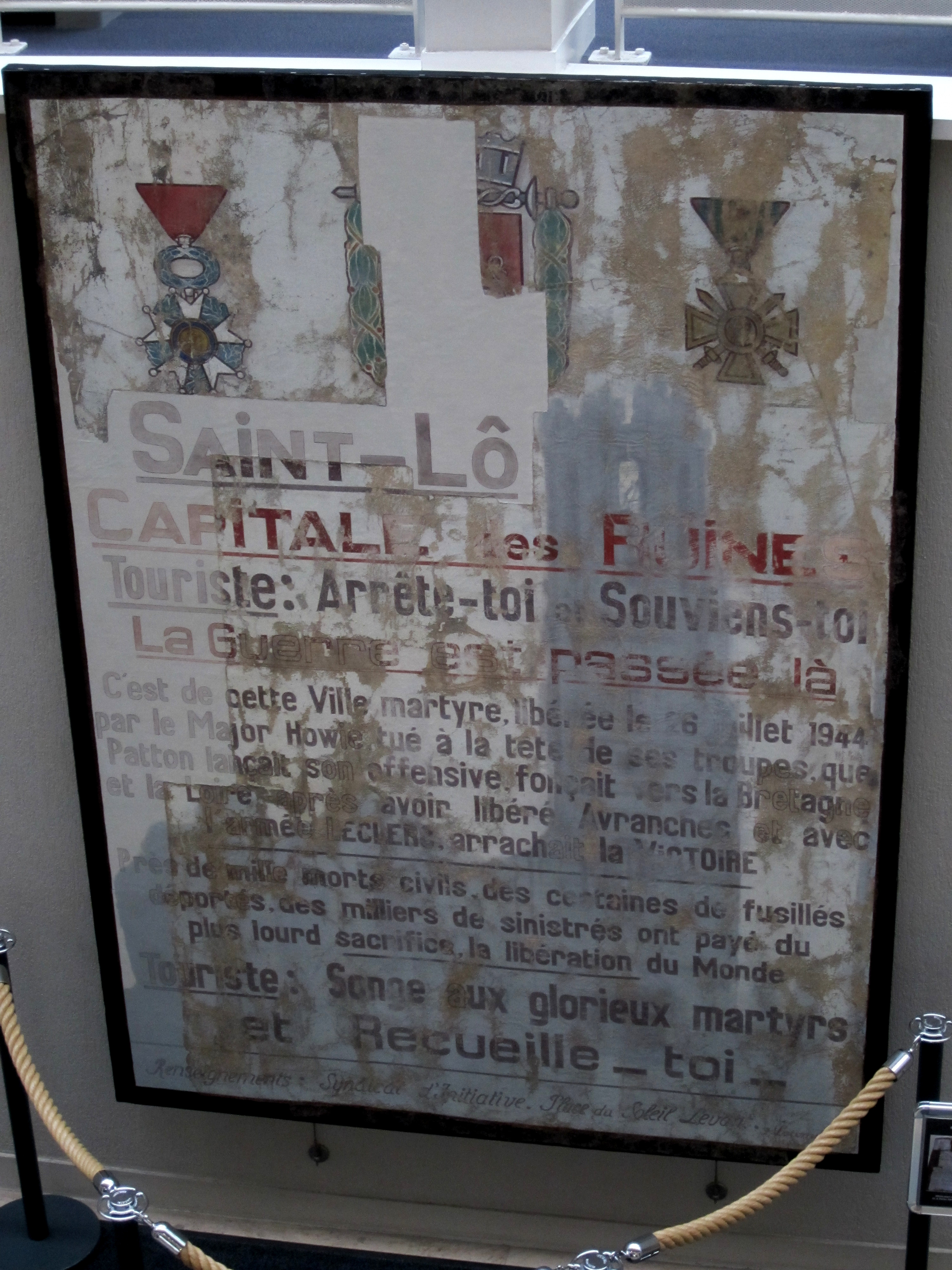 Cette affiche, présentée ici à la préfecture, était affichée à l'entrée de la ville après la guerre